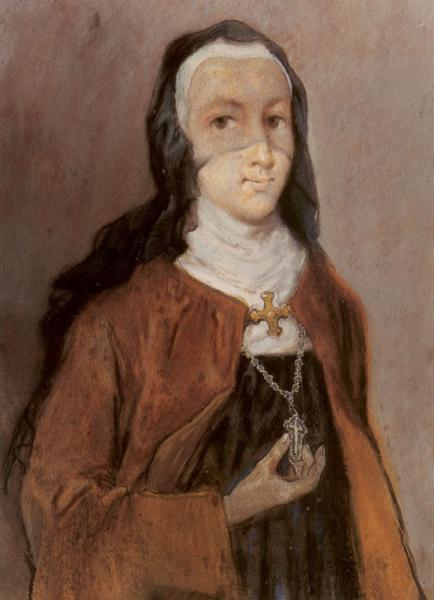 Humbelina Rosenmeyer, Äbtissin des Klosters Wormeln 1783-1797